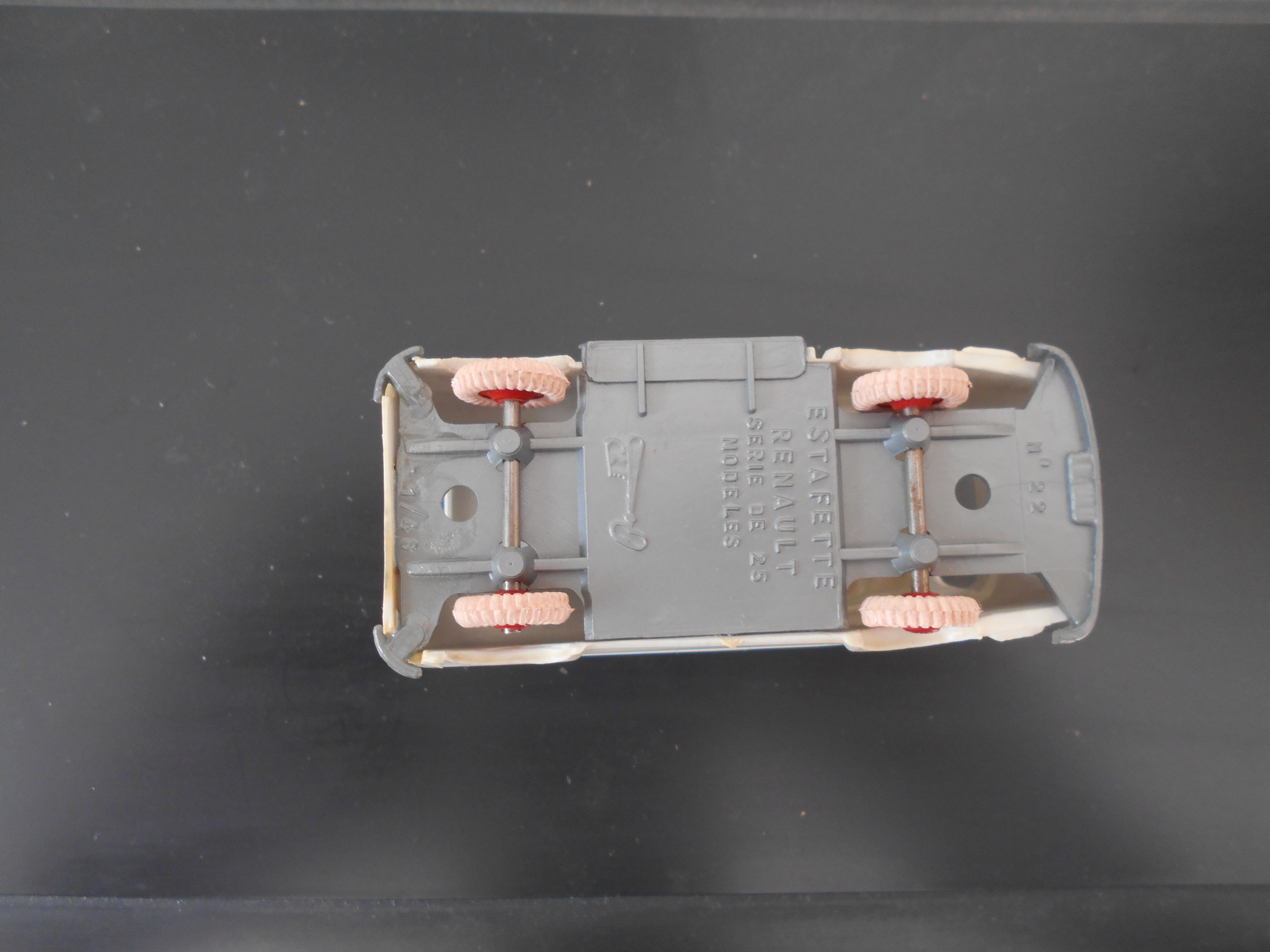 Dessous d'un jouet miniature en plastique avec la marque Clé et son logo.